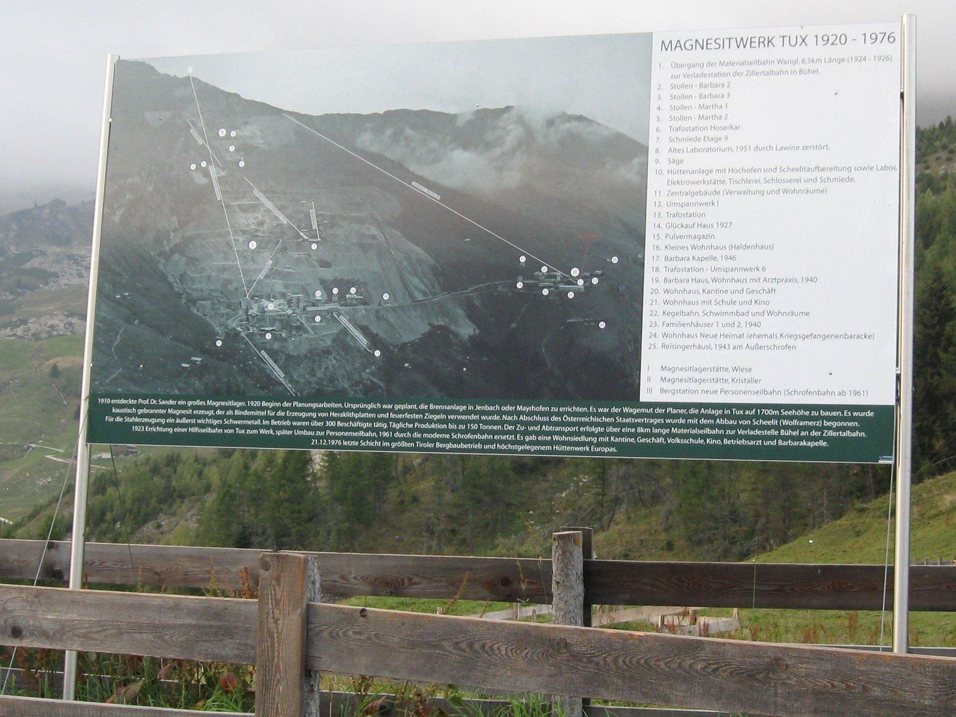 Eine bei der Schrofenalm gelegene Informationstafel über das aufgelassene Magnesitbergwerk Tux